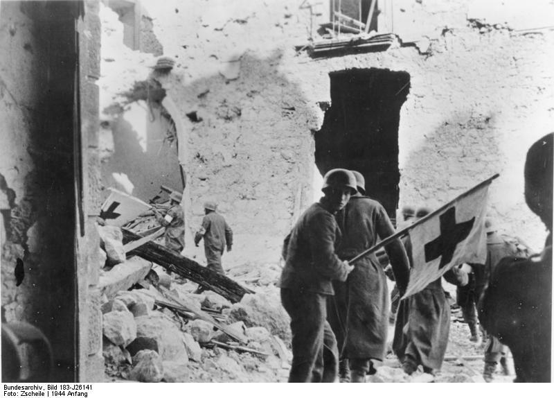 10 Minuten geisterhafte Stille im Höllenlärm von Cassino Die Sanitäter unserer Fallschirmjäger bergen ihre Verwundeten. Durch Vorantragen von Rotkreuzflaggen werden die feindeingesehenen Kampfplätze ohne beiderseitigen Beschuss nach Verwundeten abgesucht. PK-Kriegsberichter Zscheile (Scherl) Frühjahr 1944